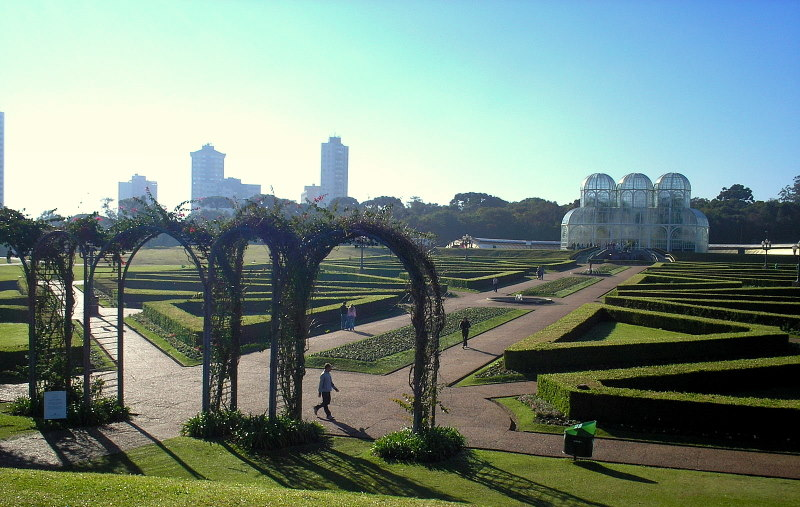 Jardim Botânico de Curitiba, PR, Sul do Brasil.